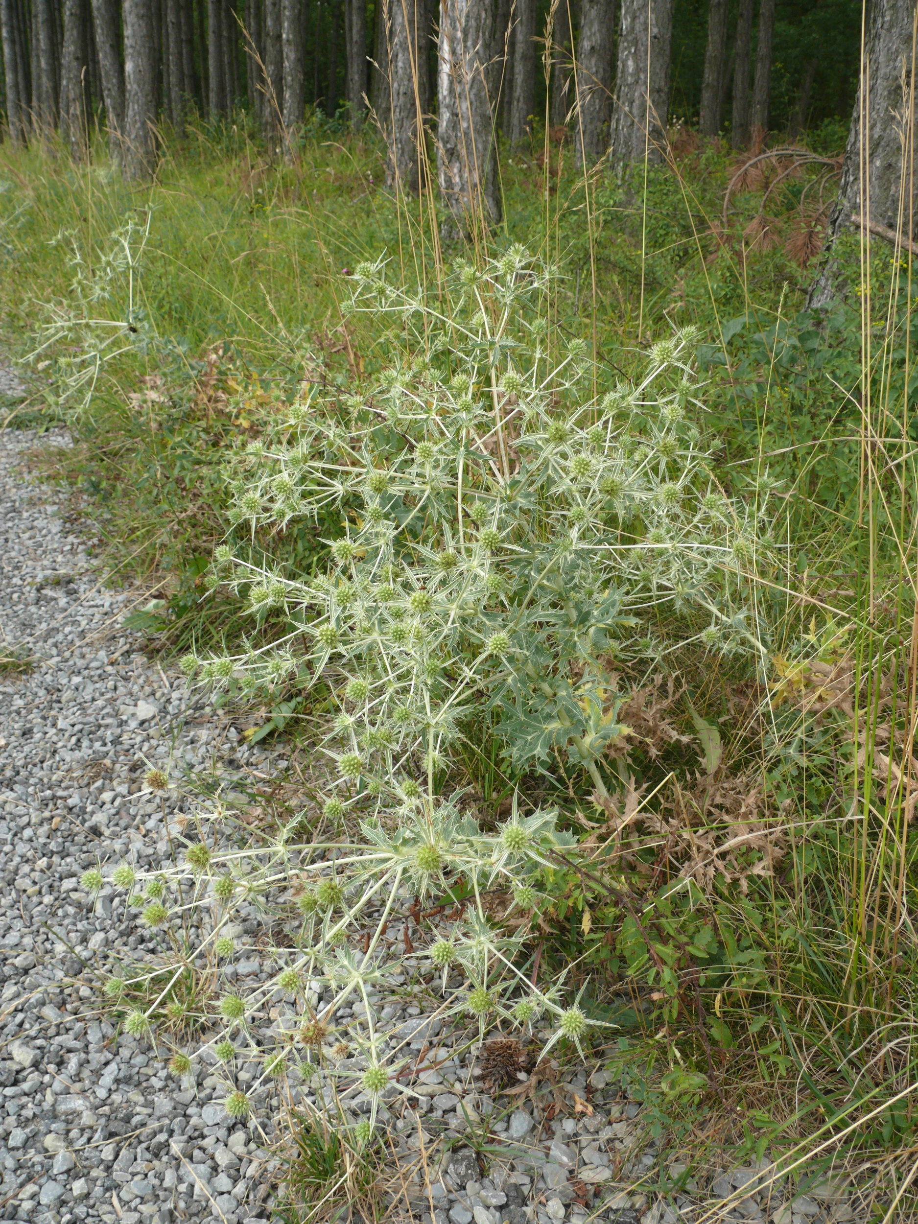 Eryngium campestre, Mainfranken